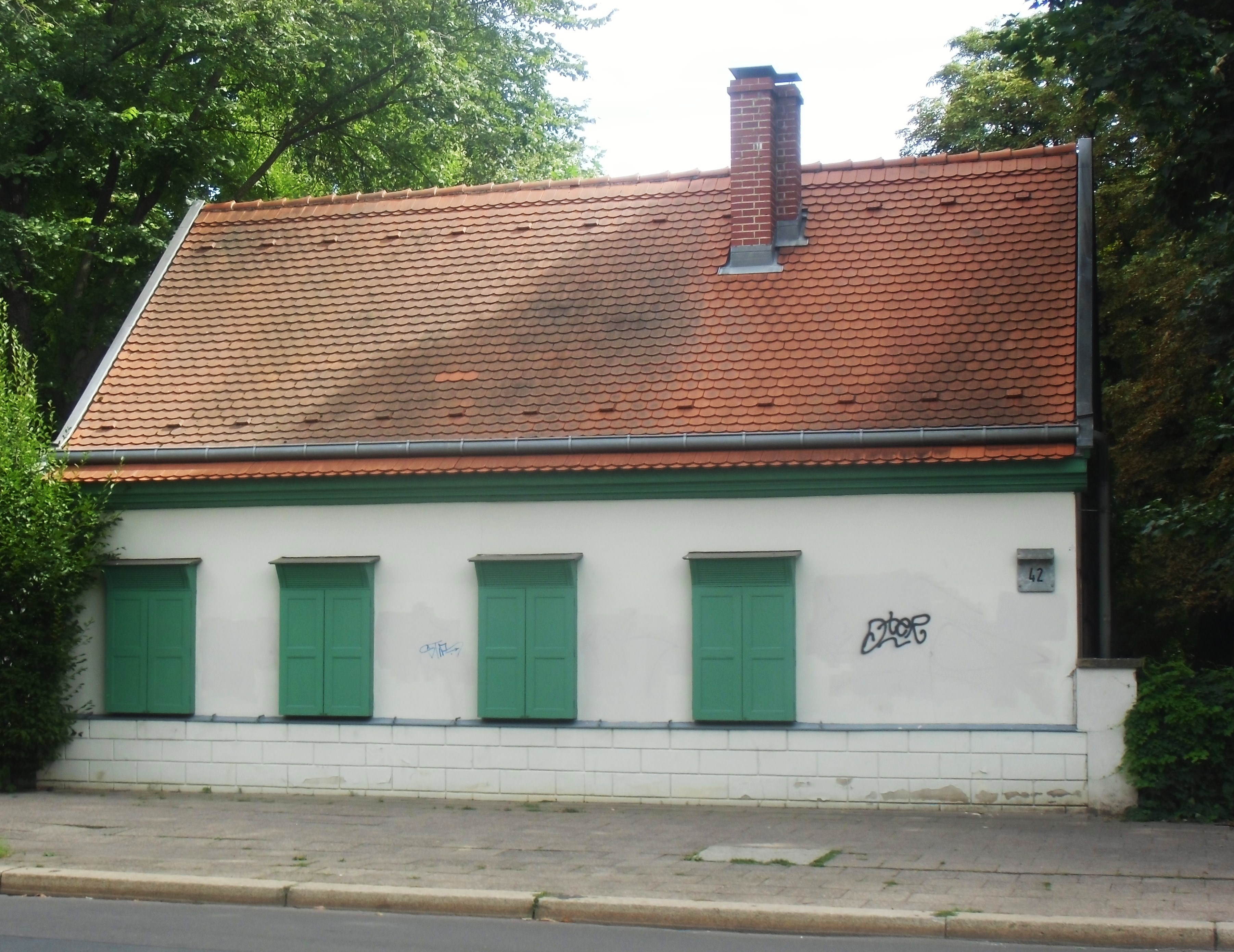 Wohnhaus im denkmalgeschützten Ensemble Dietzgenstraße, auch "Palm-Haus" genannt, erbaut 1764 für den Küster Palm